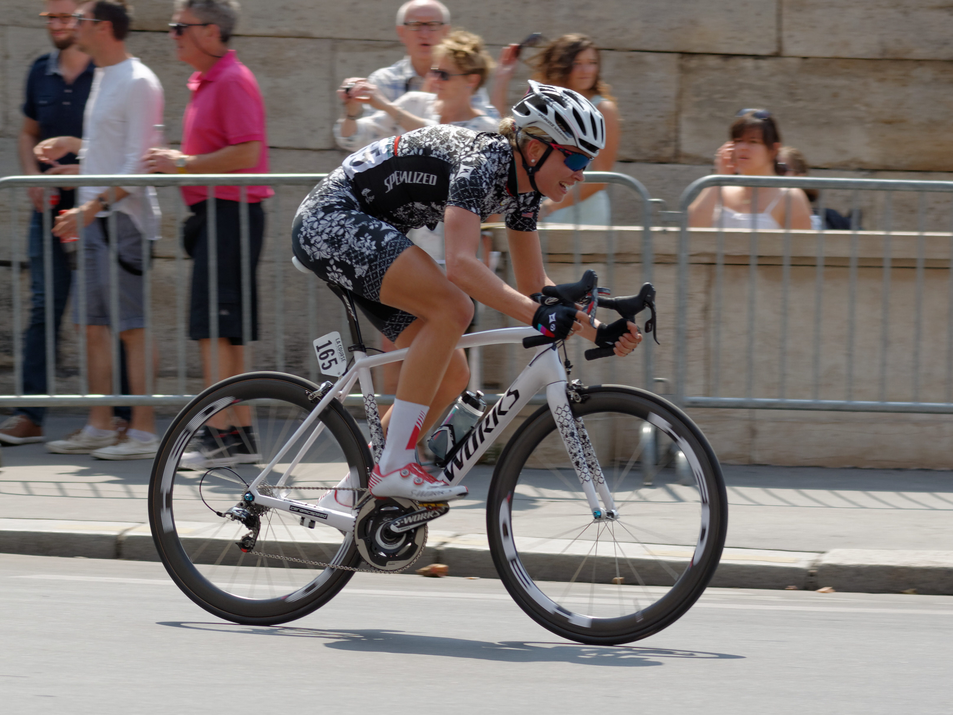 Tayler Wiles a La Course by Le Tour de France 2014